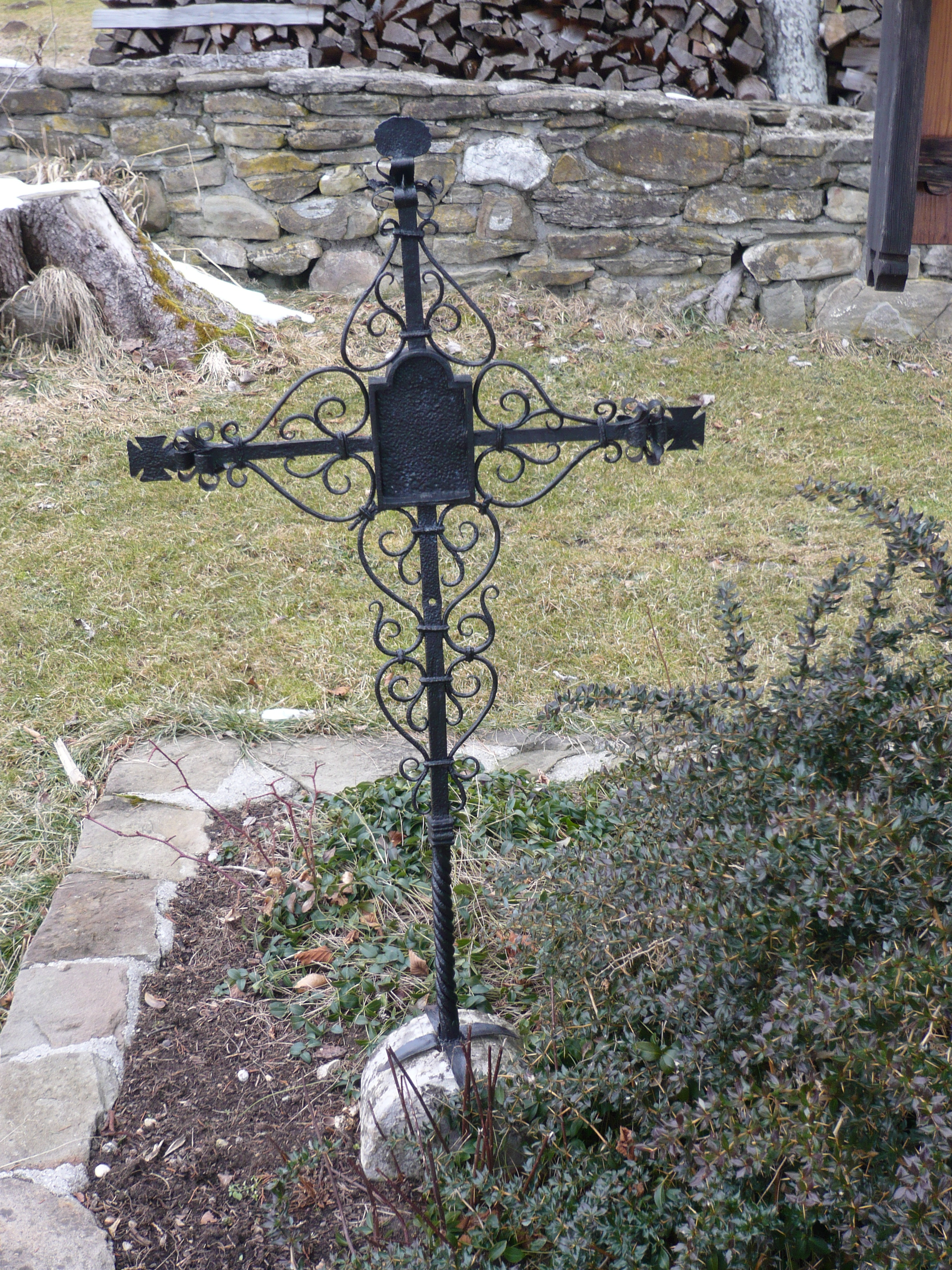 Grabkreuz von Georg Gom im Pestfriedhof Zell, Gemeinde Eisenberg (Ostallgäu)